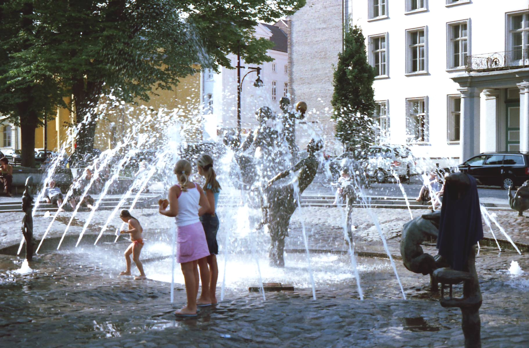 Brünnen der Lebenfreude (Fontana della gioia di vivere)